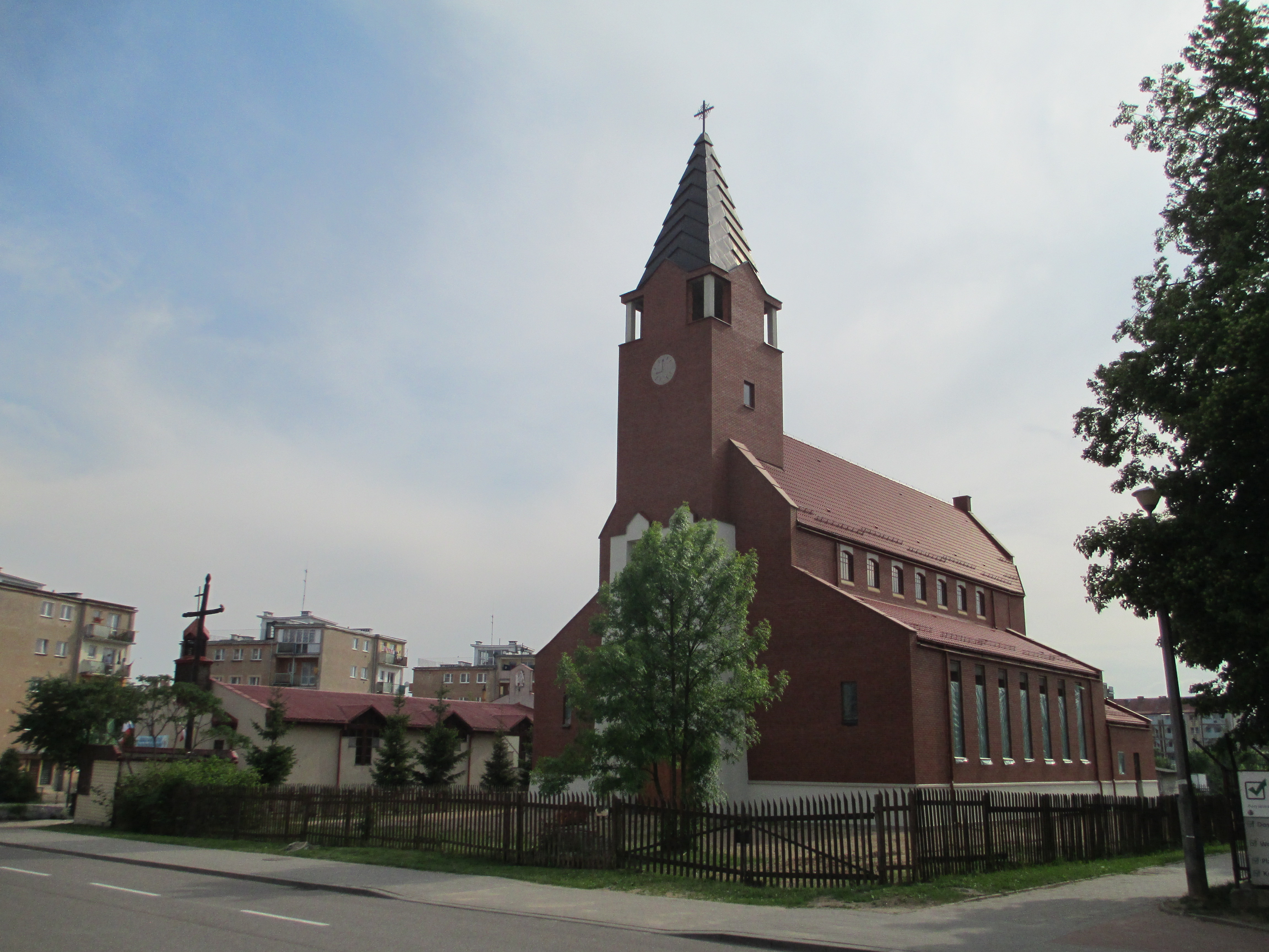 Parafia św. Jana Apostoła w Ełku